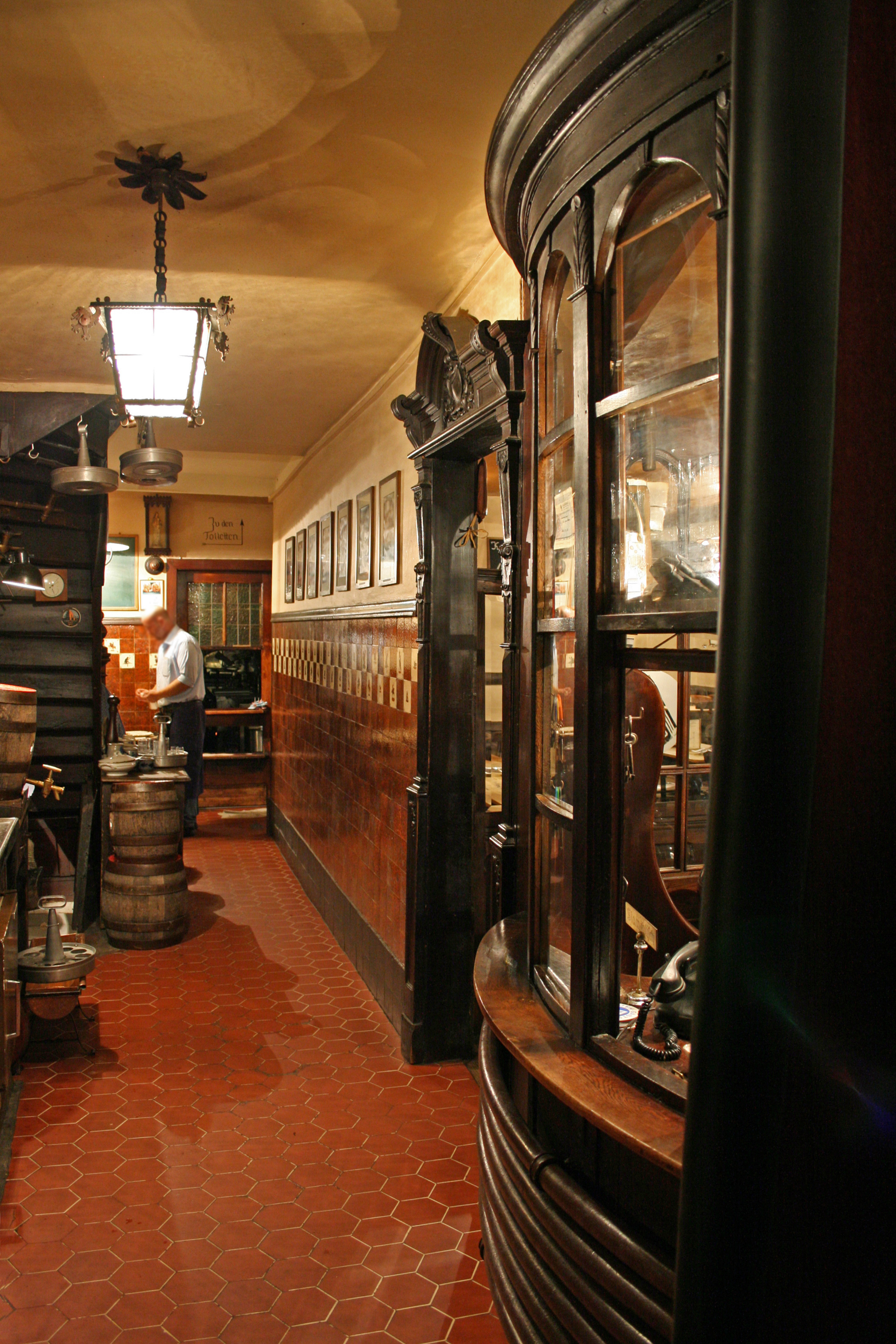 Hausflur mit Thekenschaaf im Gasthaus Haus Töller, Köln